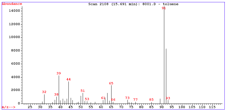 Esempio di spettro di massa; acquisito e adattato da Paginazero